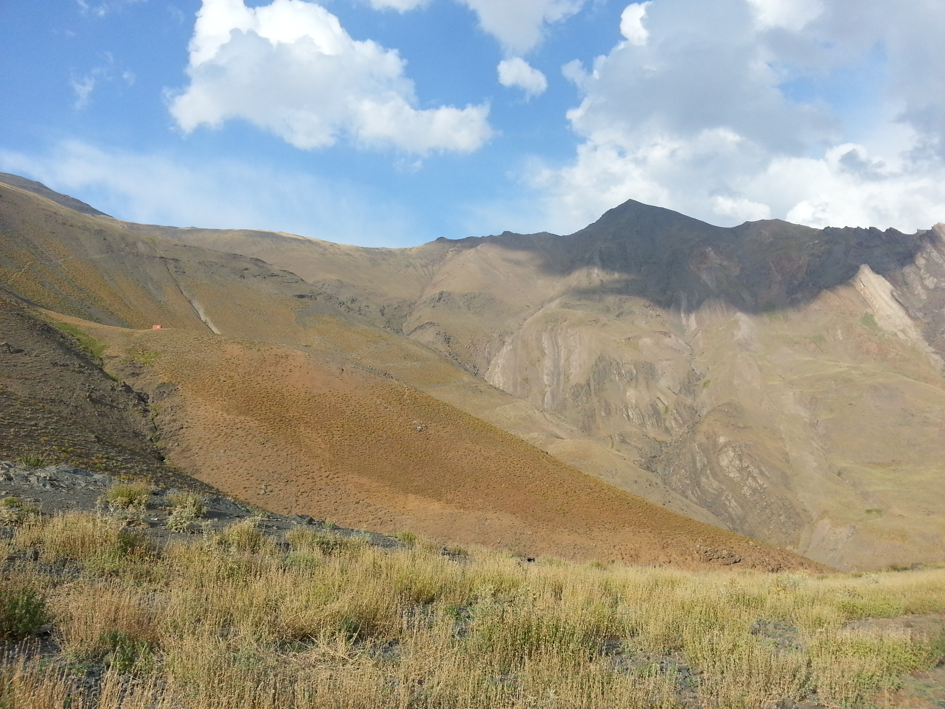 قله سیالان و پناهگاه مسیر جنوبی +36° 30' 41.89", +50° 41' 54.63" 4185 m Sialan shelter +36° 30' 21.10", +50° 40' 9.10" 3271 m